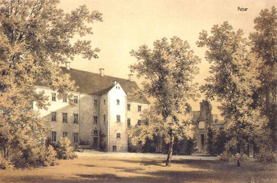 Neues Schloss Putzar, daneben die Ruine vom alten Schloss - Postkarte um 1900 (heute sind beide Bauten Ruinen) - links Joachimsbau der bis 1970 genutzt wurde; rechts Ulrichsbau (verfällt seit 18. Jahrhundert)